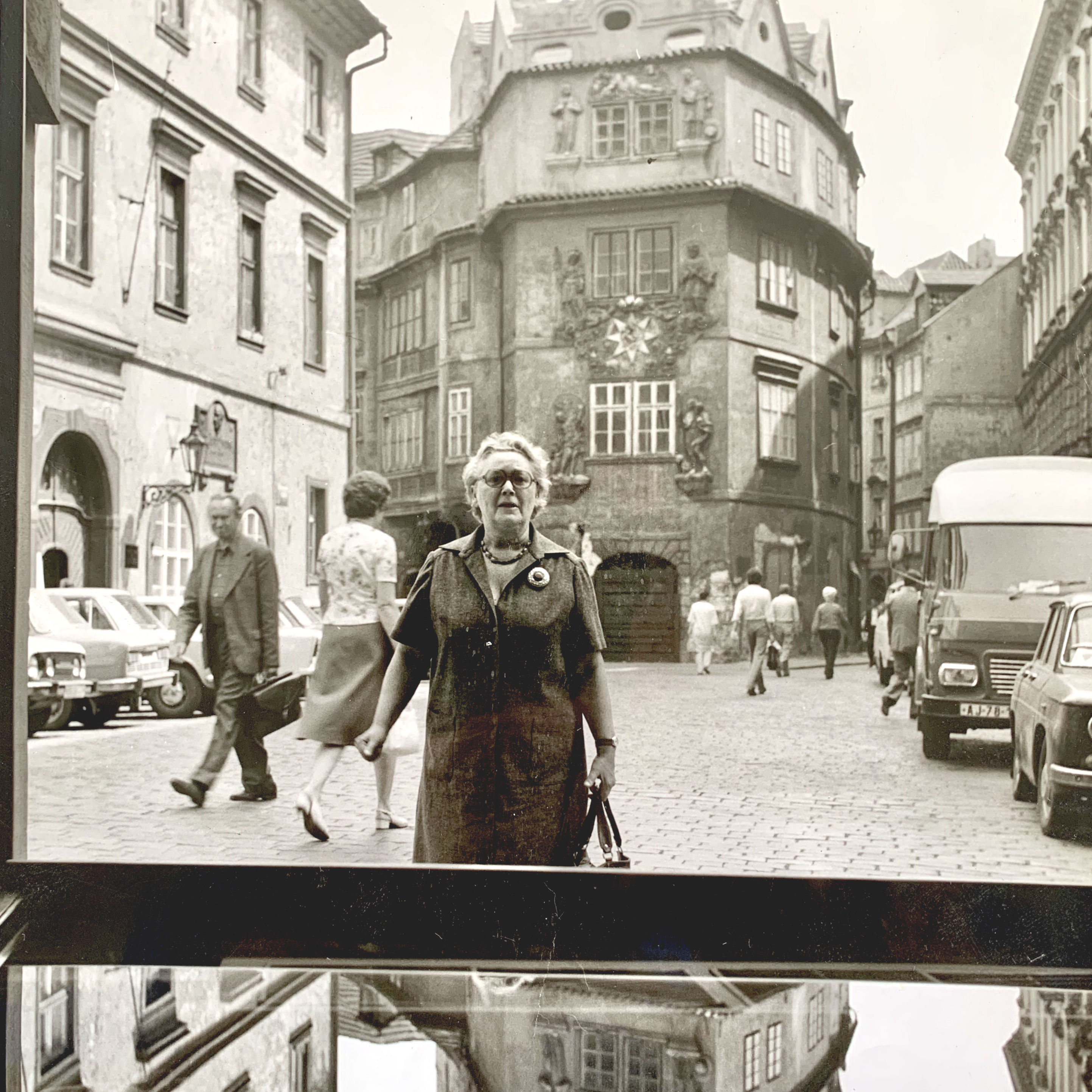 Anna Rottová Kadeřábková v Karlovce, 80. léta (datum scanu fotky je přibližné)